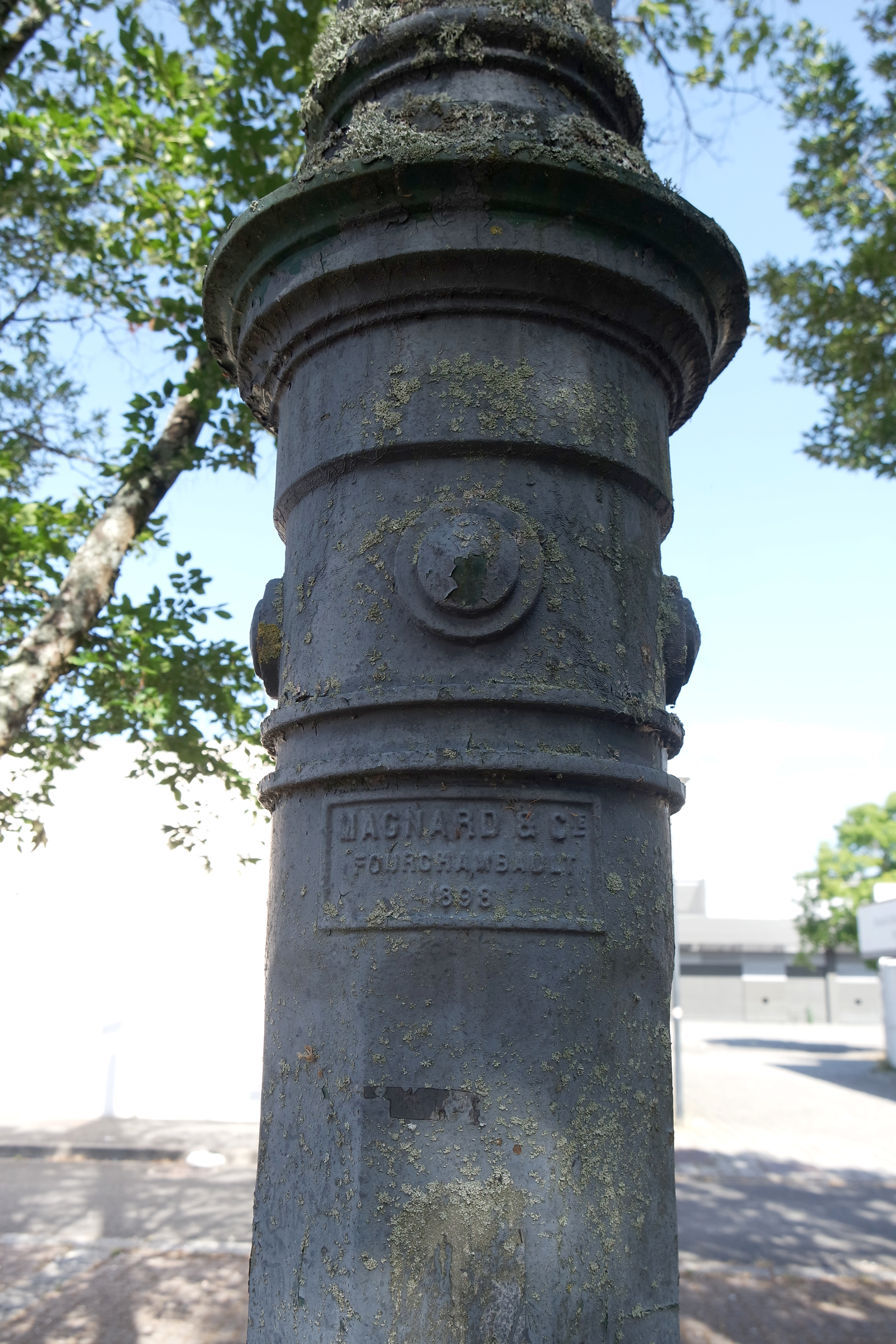 Portique de la place Daniel-Chenut aux Courlis, Nevers France.